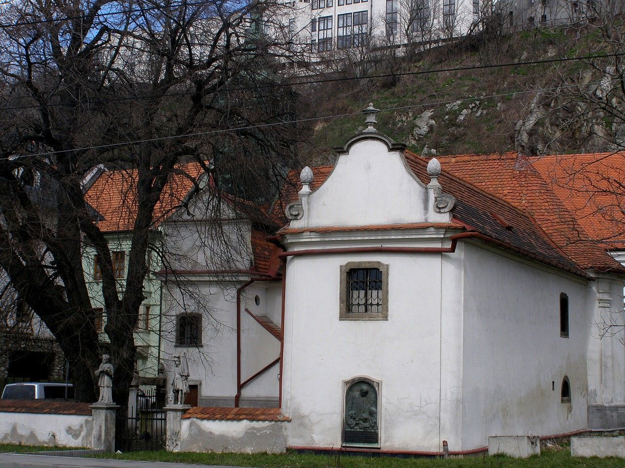 Barokový Kostol Najsvätejšej Trojice v bratislavskom podhradí pochádza z prvej polovice 18. storočia